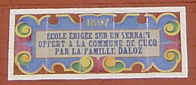 Photo prise par moi-même au Touquet le 15 juillet 2006